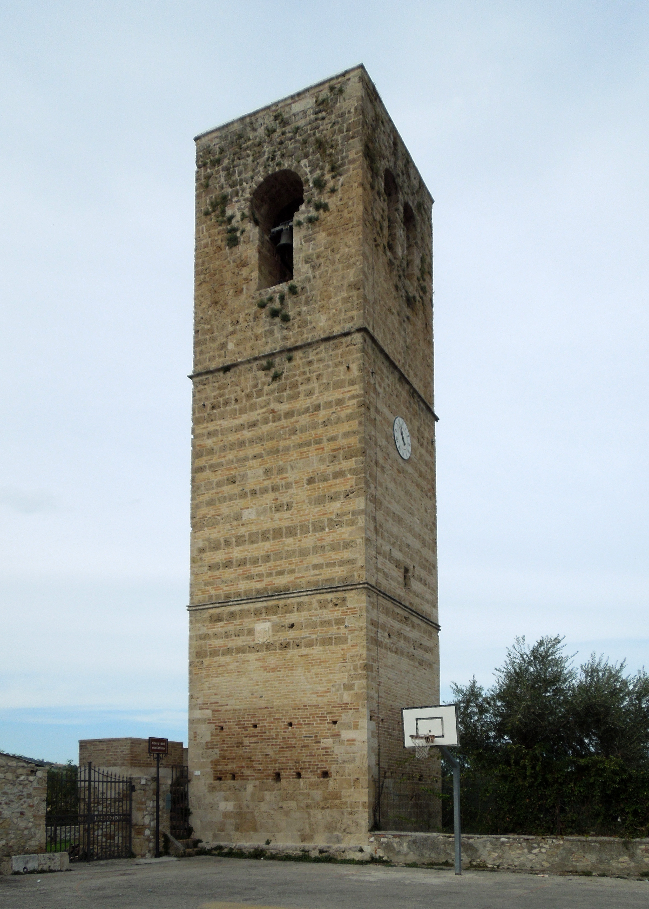 Torre del Melatino di Nocella di Campli in provincia di Teramo.